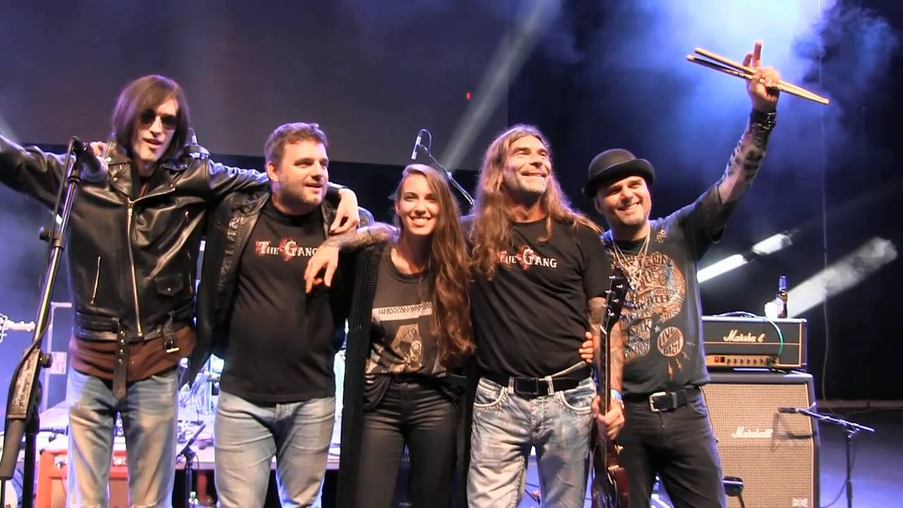 The Gang - Live at Docesna 2018